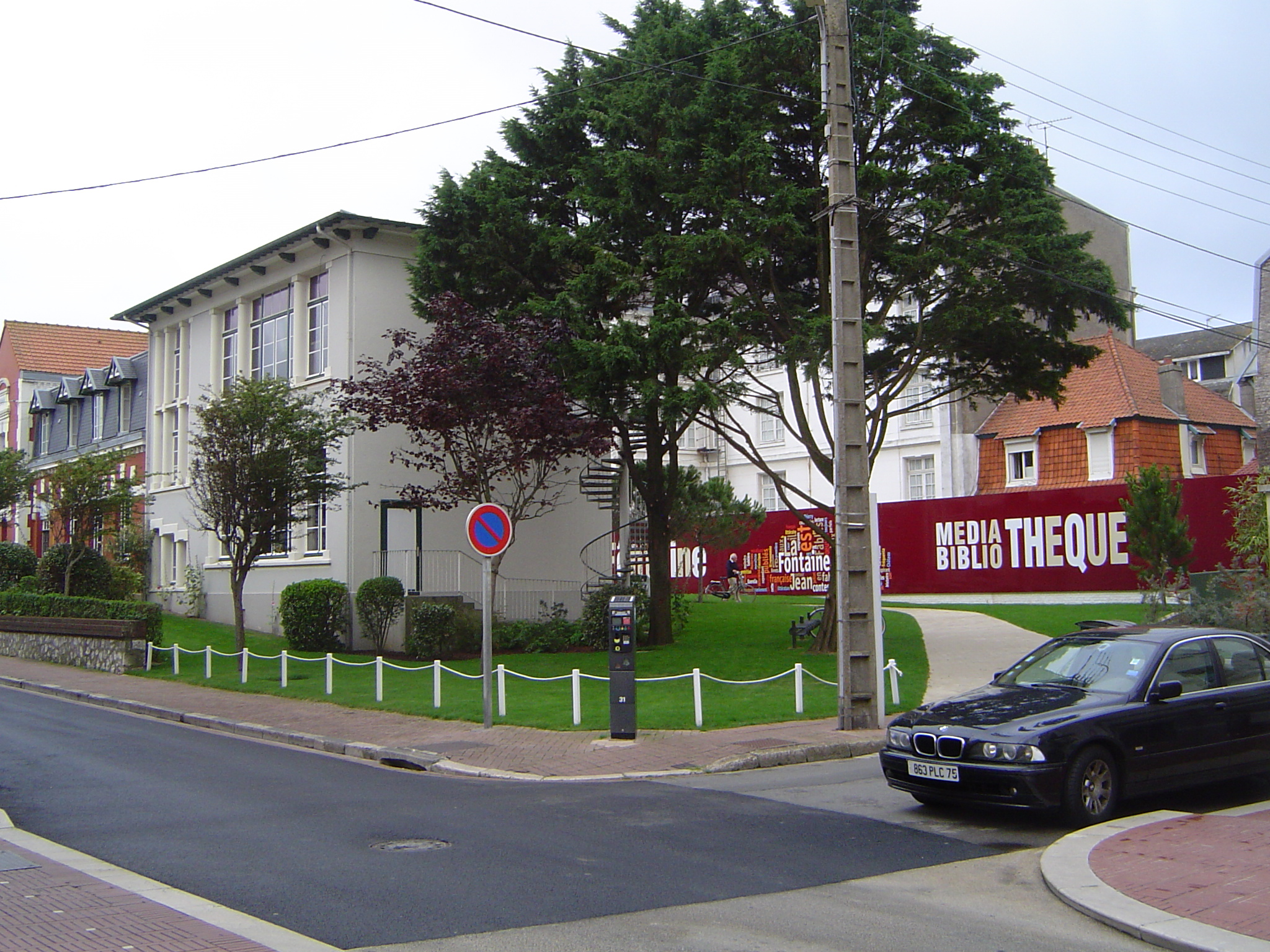 Le Touquet-Paris-Plage - église Sainte-Jeanne d'Arc